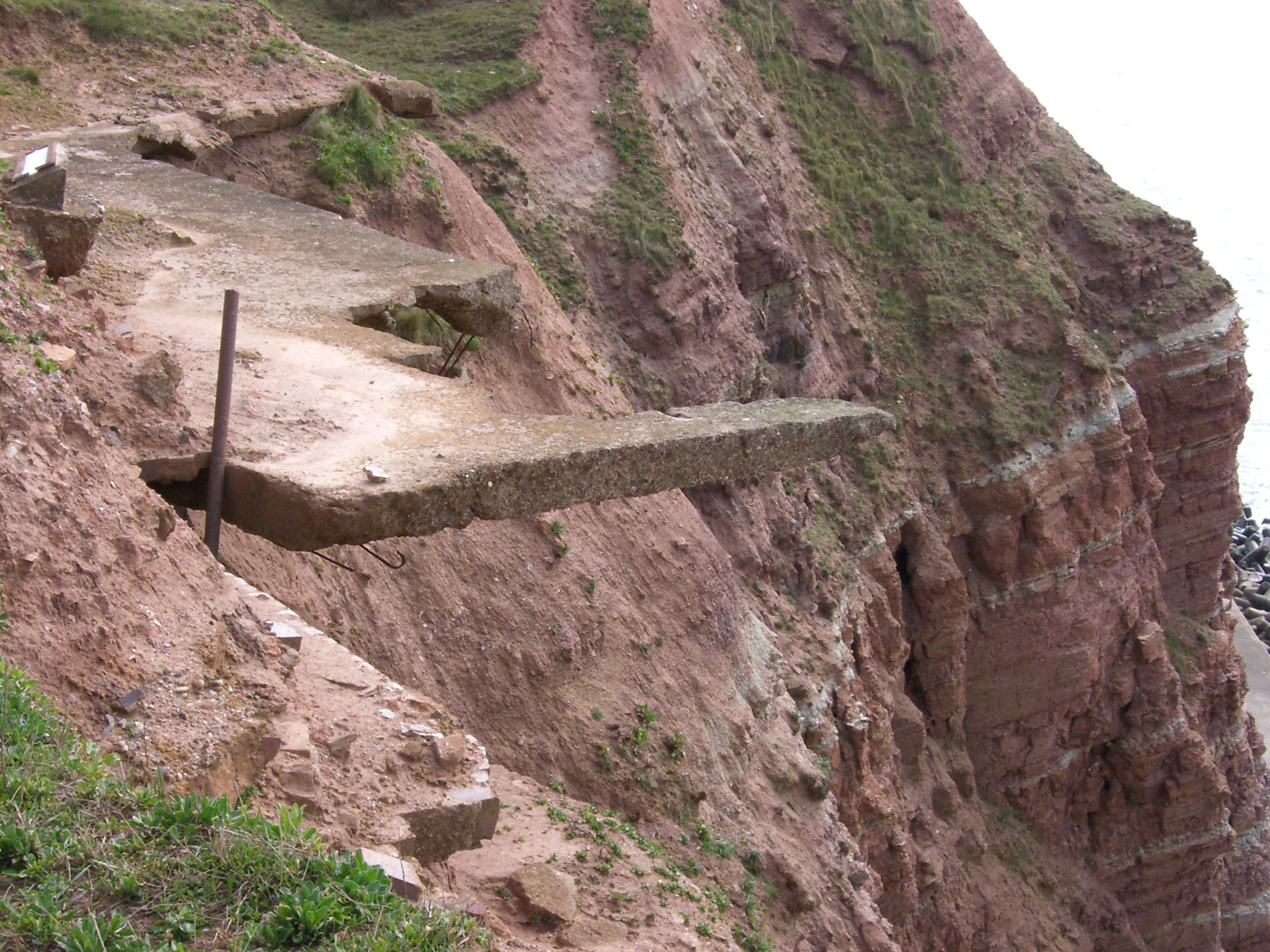 Helgoland, Betonreste an der Abbruchkante